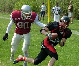 2006 Liga-MVP Thomas Linnemann har netop grebet en bold for touchdown i kampen mod Esbjerg.